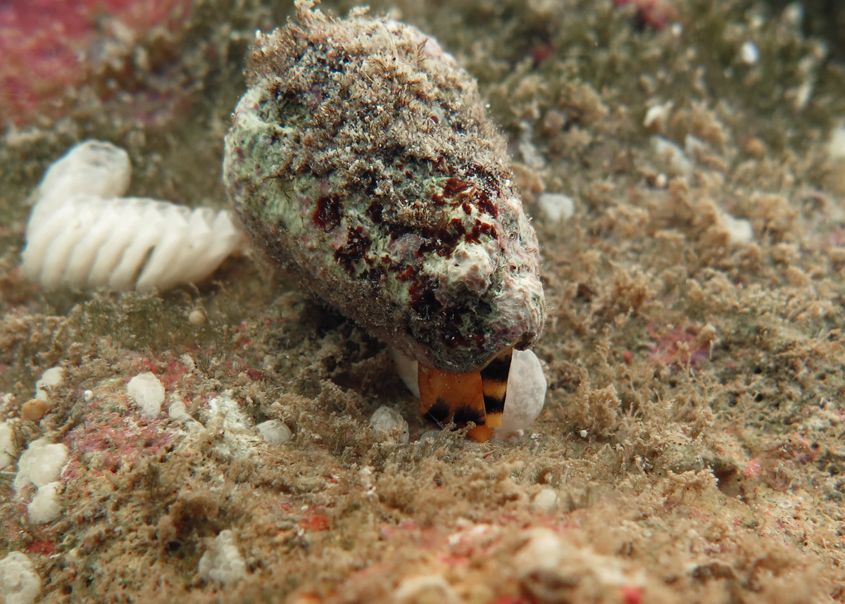 Un cône (peut-être C. frigidus) en train de pondre à la Réunion.